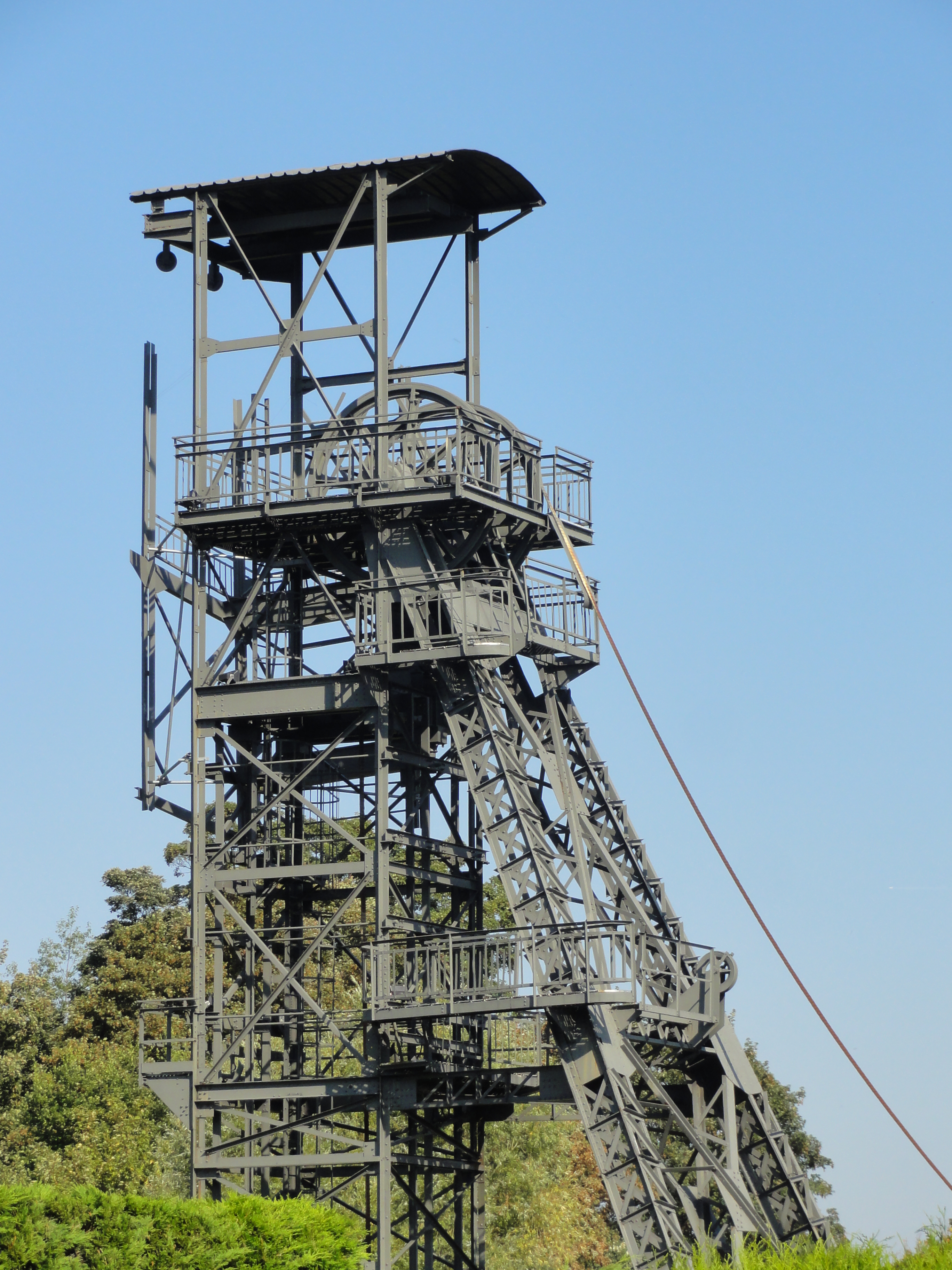 La fosse no 2 dite Saint-Émile de la Compagnie des mines de Marles était un charbonnage du bassin minier du Nord-Pas-de-Calais constitué d'un seul puits situé à Marles-les-Mines, Pas-de-Calais, Nord-Pas-de-Calais, France. L'avaleresse no 1 est localisée sur le site. Le chevalement de la fosse no 2 avec les parties anciennes du bâtiment de la machine d'extraction sont inscrits aux monuments historiques le 6 mai 1992. La fosse est également inscrite sur la liste du patrimoine mondial par l'Unesco le 30 juin 2012 et y constitue le site no 101. .